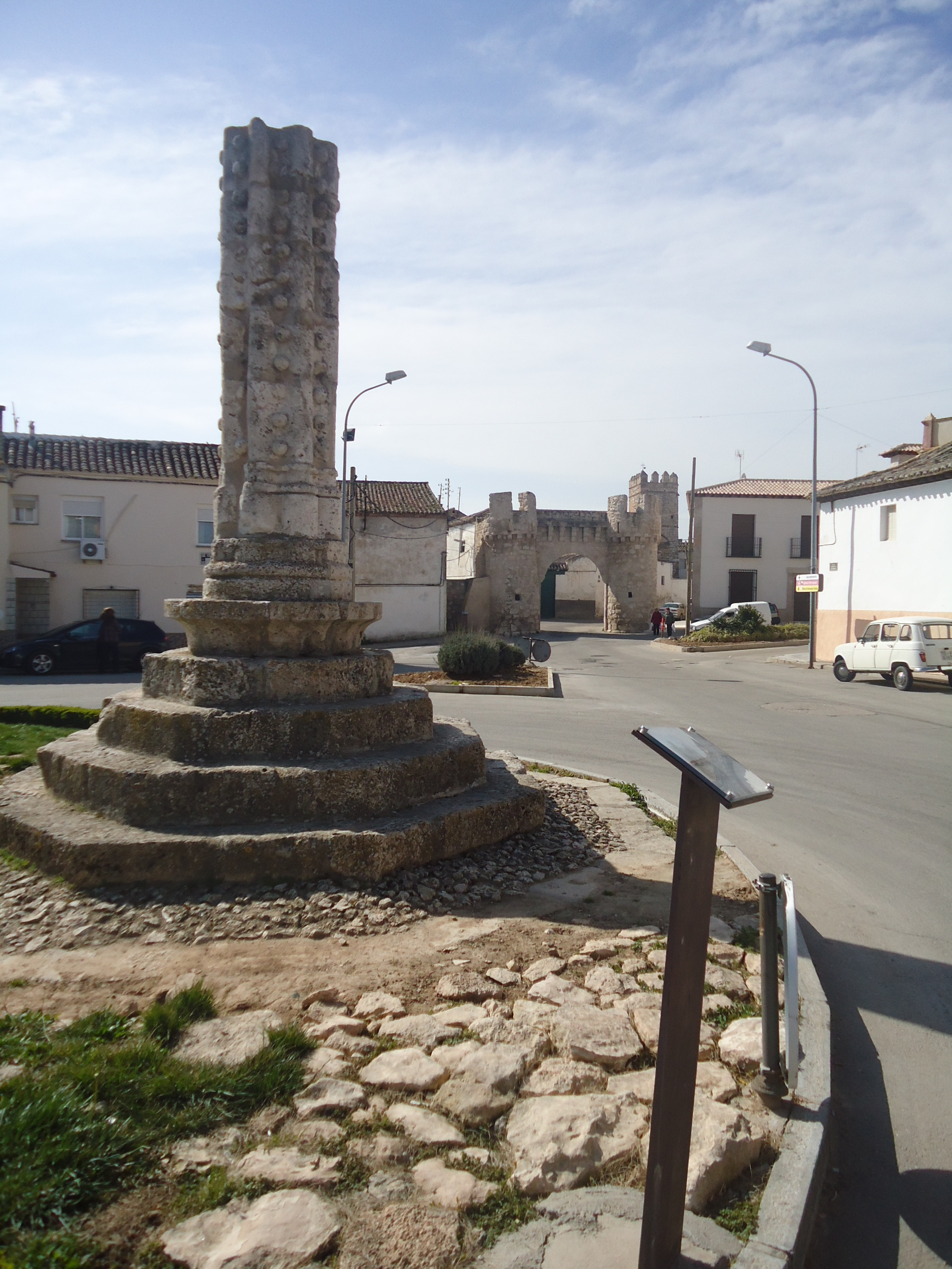 Picota, Puerta de Ocaña y Torre